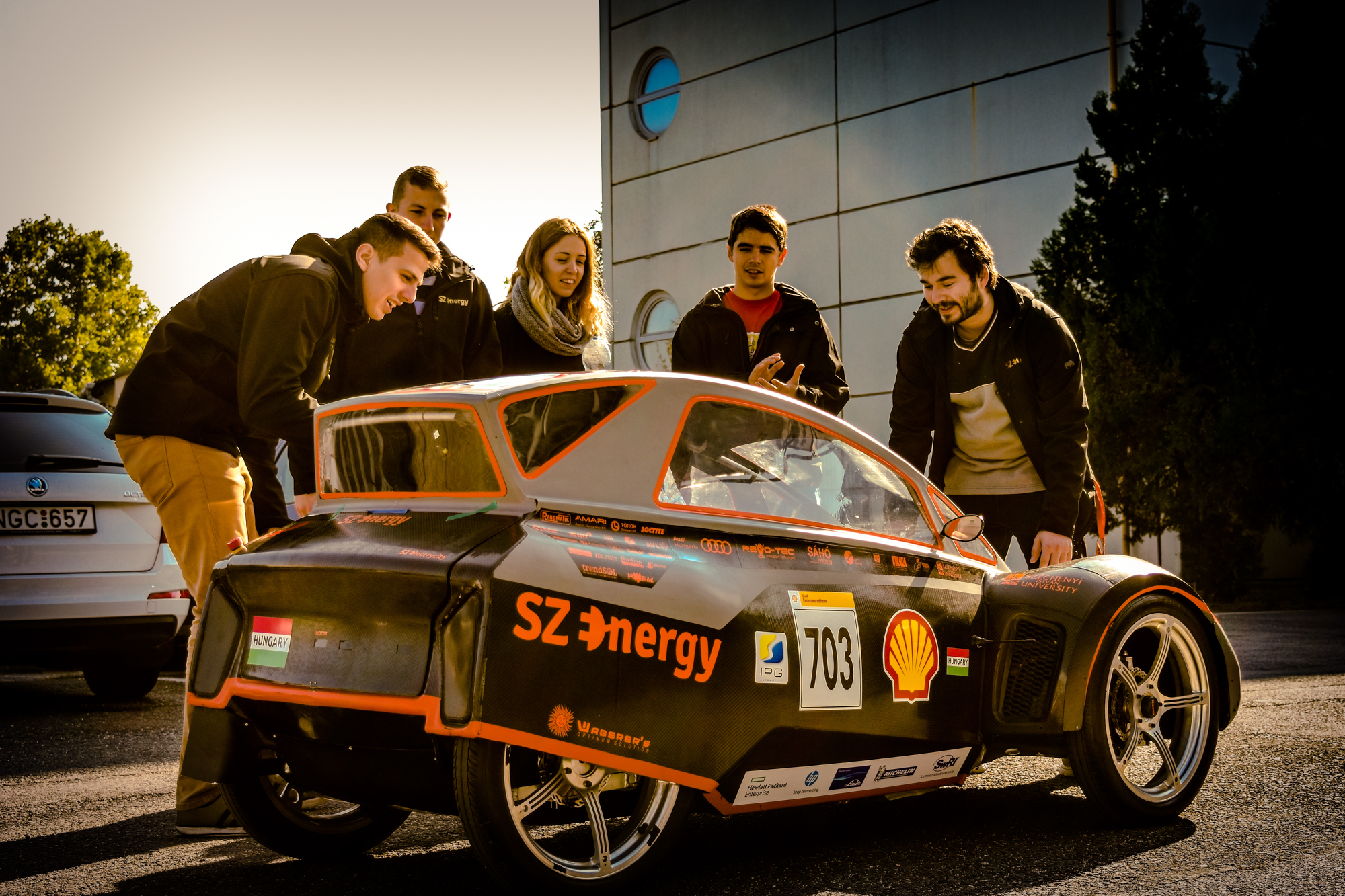 Shell Eco autó